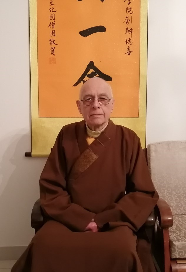 Savant universitaire et Maître bouddhiste